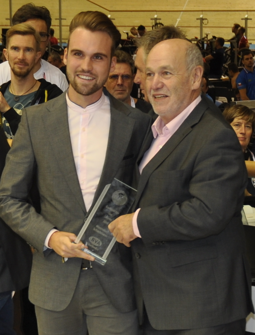 Ehrung Radsportler/in des Jahres: Maximilian Schachmann (l.), Günther Oßwald